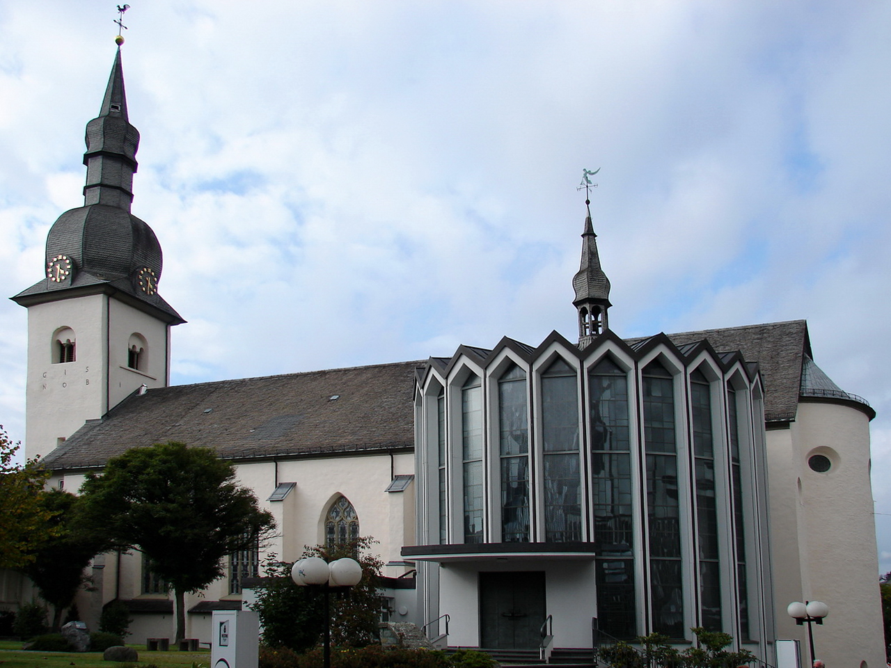 Das Stift Meschede war ursprünglich ein in karolingischer Zeit gegründetes Damenstift. Im 14. Jahrhundert wurde es in eine von männlichen Kanonikern bewohnte Gemeinschaft umgewandelt. In dieser Form bestand die Einrichtung bis zur Säkularisation 1803/05. Seither wird die Stiftskirche als Pfarrkirche St. Walburga in Meschede genutzt.